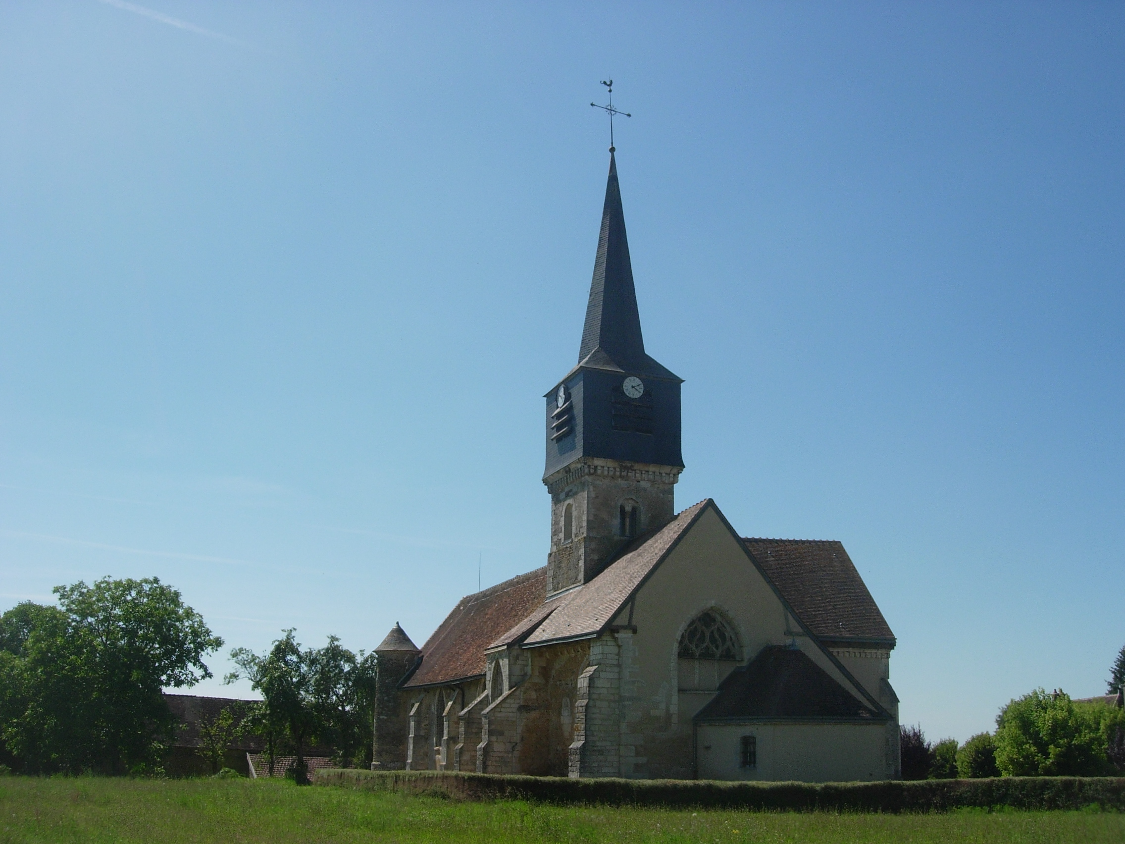 Eglise de Lignières (Aube)